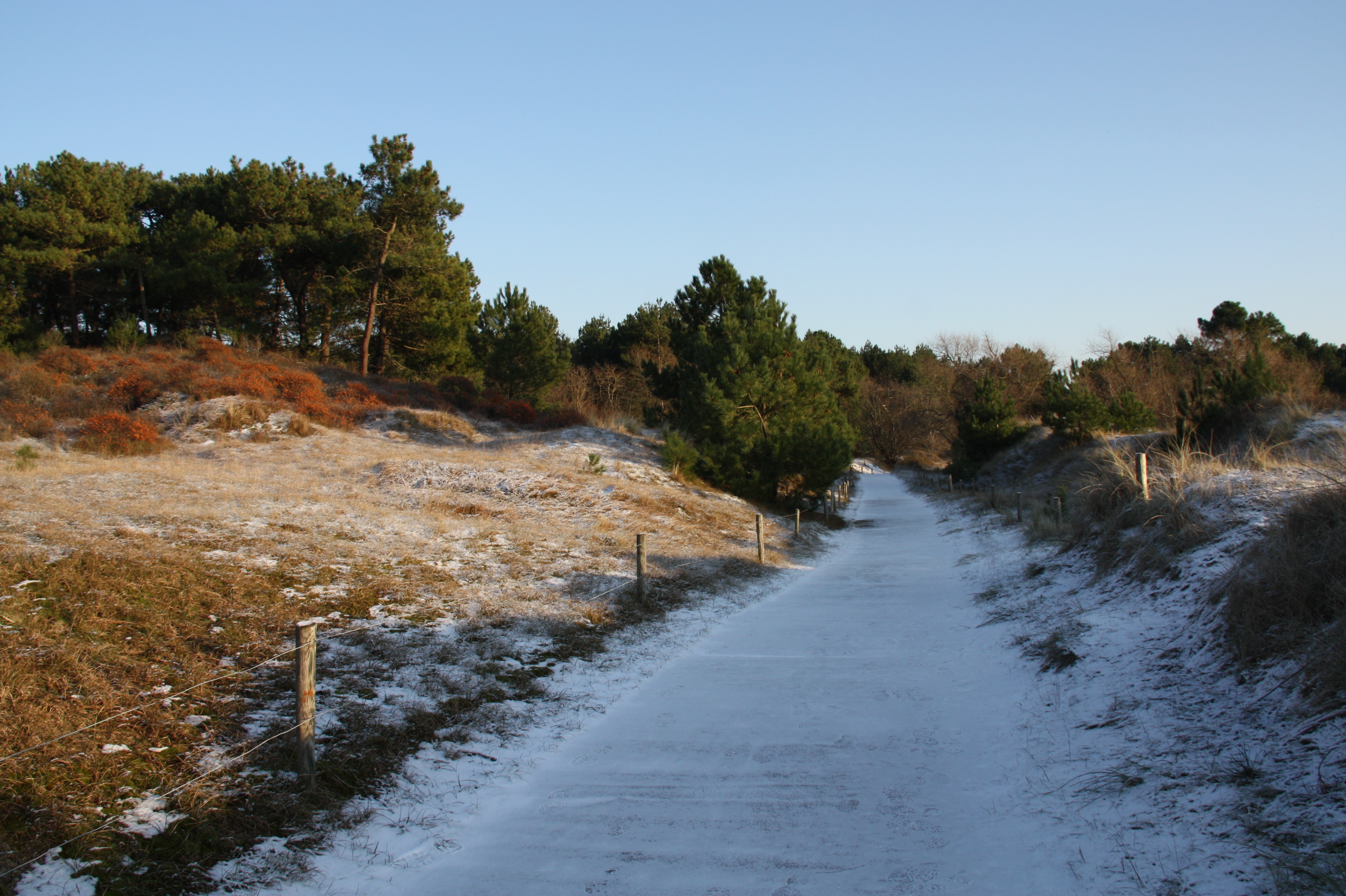 Parc naturel régional des caps et marais d'Opale - Le Conservatoire de l'espace littoral et des rivages lacustres - forêt d'ECAULT - Le chemin des juifs